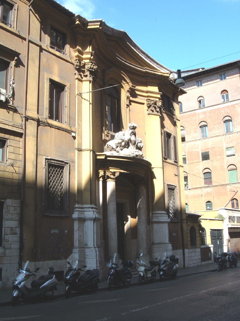 Eglise de Saint Paul premier ermite, qui se trouve à Rome, dans le "rione Monti".